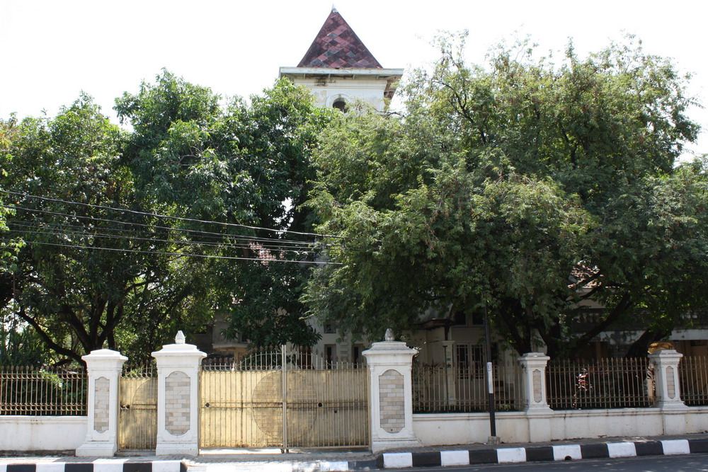 Gedung Jangkung Majalengka- Jl Abdul Halim, Kecamatan Majalengka, Kabupaten Majalengka, Jawa Barat, Indonesia Date